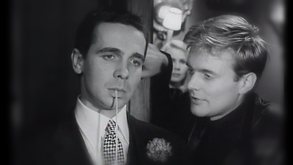 Fotogramma dal film Oggi a Berlino (1962) di Piero Vivarelli. Da sinistra: Enrico de Boccard, Erina Torelli e Helmut Griem.